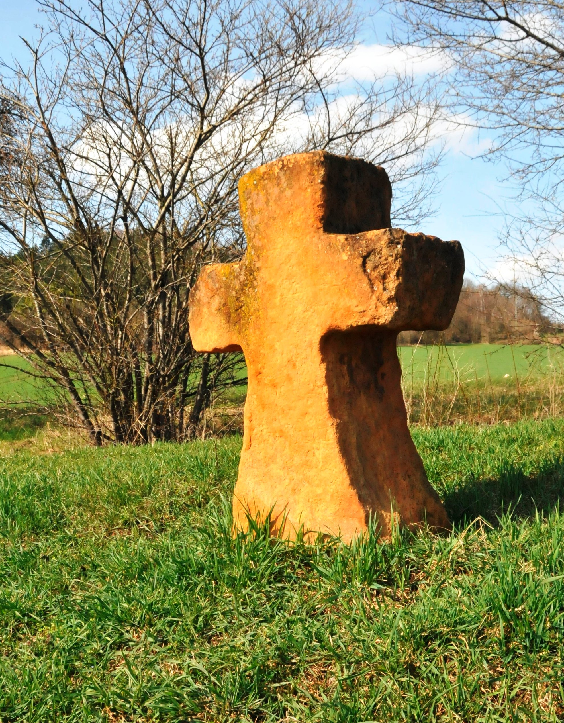 Freudenthal, eines der beiden Steinkreuze